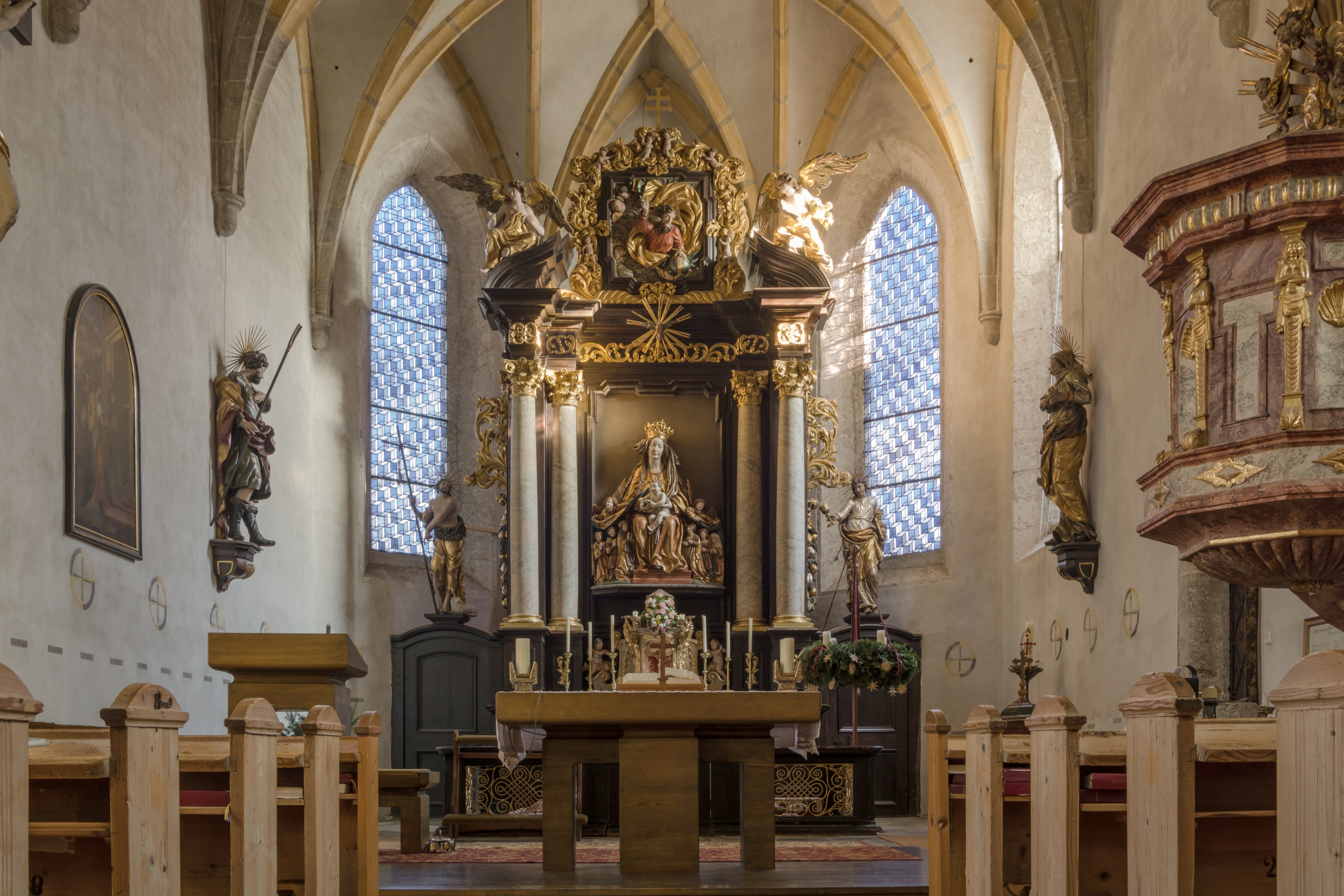 Wallfahrtskirche Mariä Heimsuchung und Friedhof